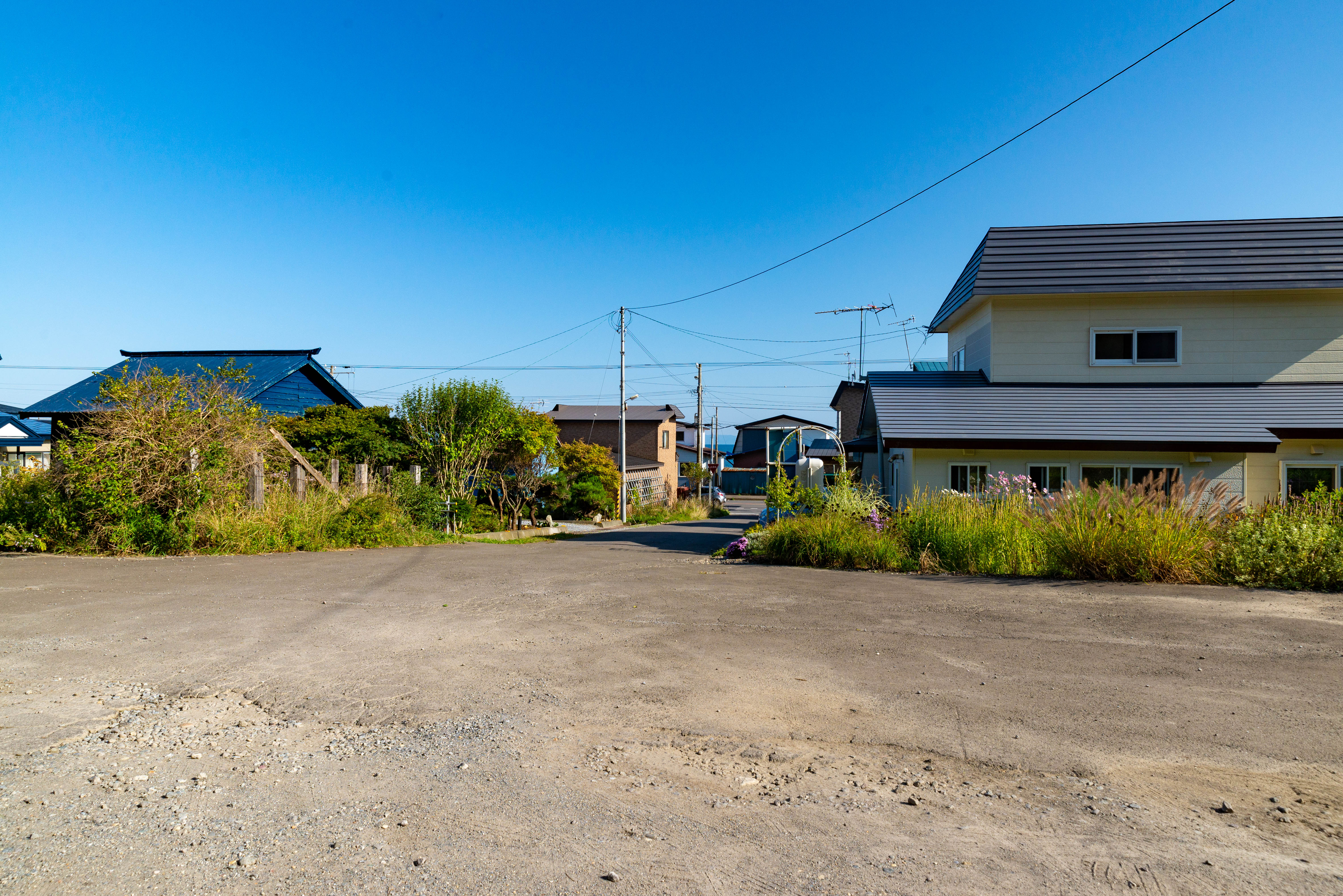 道南いさりび鉄道株式会社釜谷駅駅前 （北海道旅客鉄道株式会社江差線釜谷駅駅前）